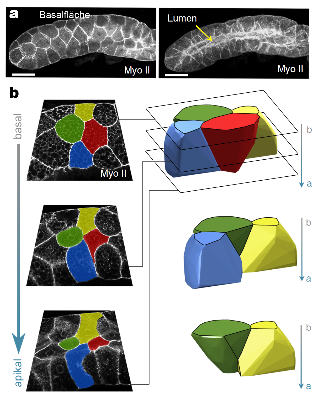 a) Konfokalmikroskopische Aufnahme einer Drosophila-Speicheldrüse (3. Larvalstadium), links auf die Basisfläche, rechts auf den Bereich des Lumens fokussiert, Maßstabsbalken = 100 µm. b) Konfokalmikroskopische Aufnahmen einer „apico-basal cell intercalation“ im Epithel einer Drosophila-Speicheldrüse und entsprechende 3D-Rekonstruktion. Die vier betreffenden Zellen sind grün, gelb, rot und blau markiert bzw. dargestellt. In der obersten Darstellung der 3D-Rekonstruktion ist die ungefähre Lage der Fokalebenen der drei Aufnahmen verzeichnet. In den anderen beiden Darstellungen der 3D-Rekonstruktion sind zur besseren Nachvollziehbarkeit der Kontaktflächenverläufe die rote bzw. die rote und blaue Zelle weggelassen.